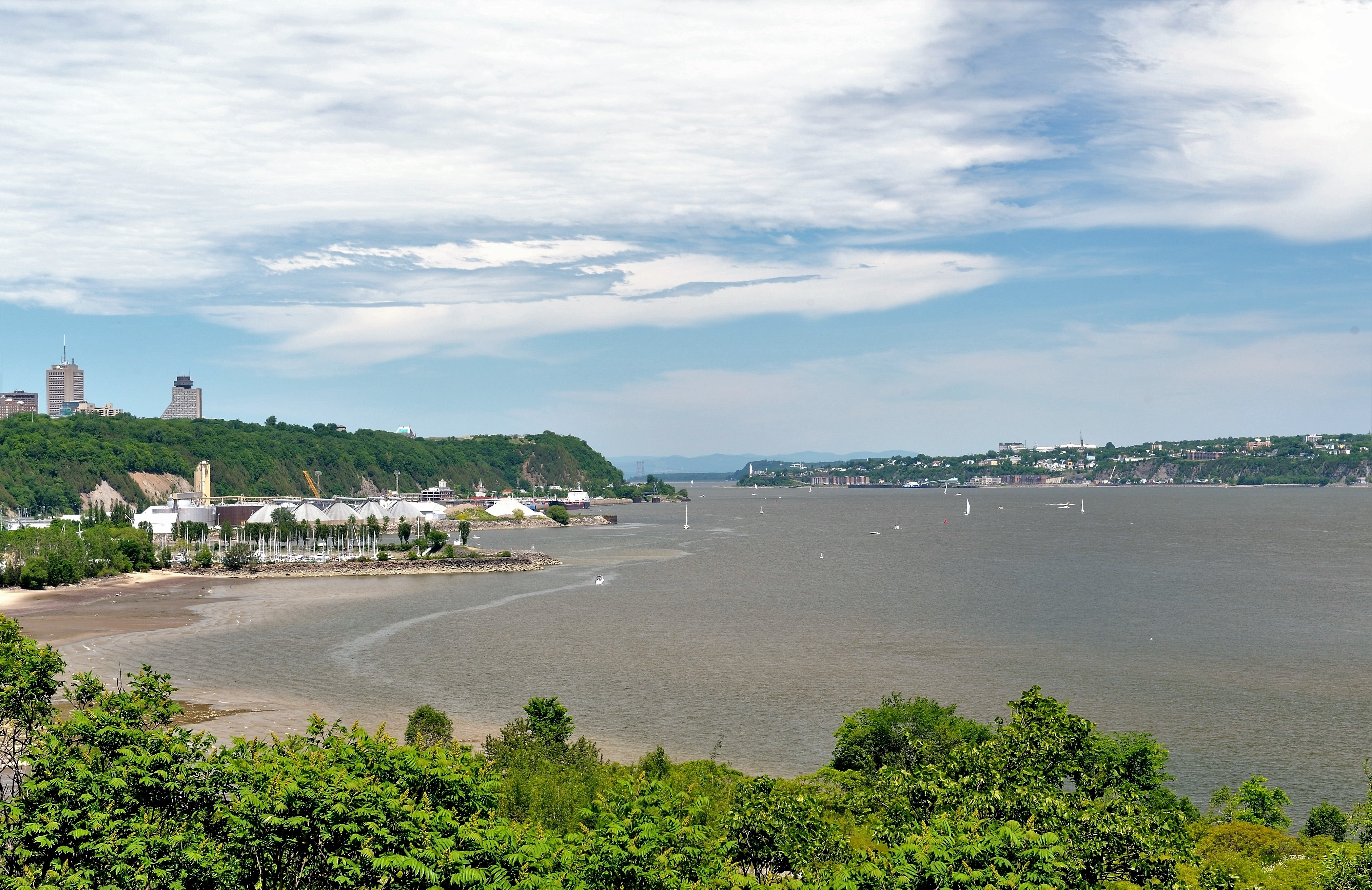 Vaste panorama du fleuve St-Laurent embrassant la marina de Sillery jusqu'au Cap Diamant de Québec.